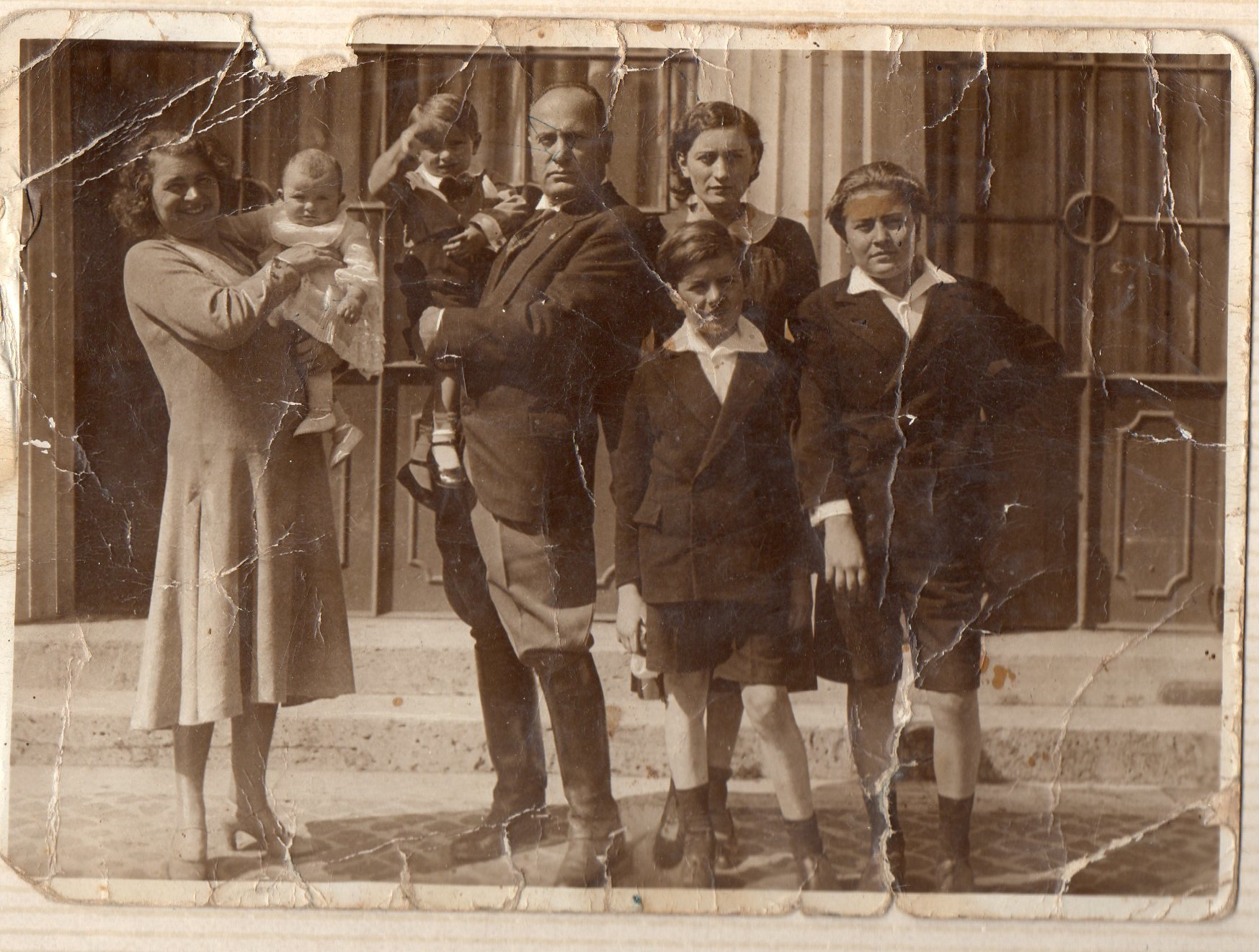 Benito MUSSOLINI con la famiglia.